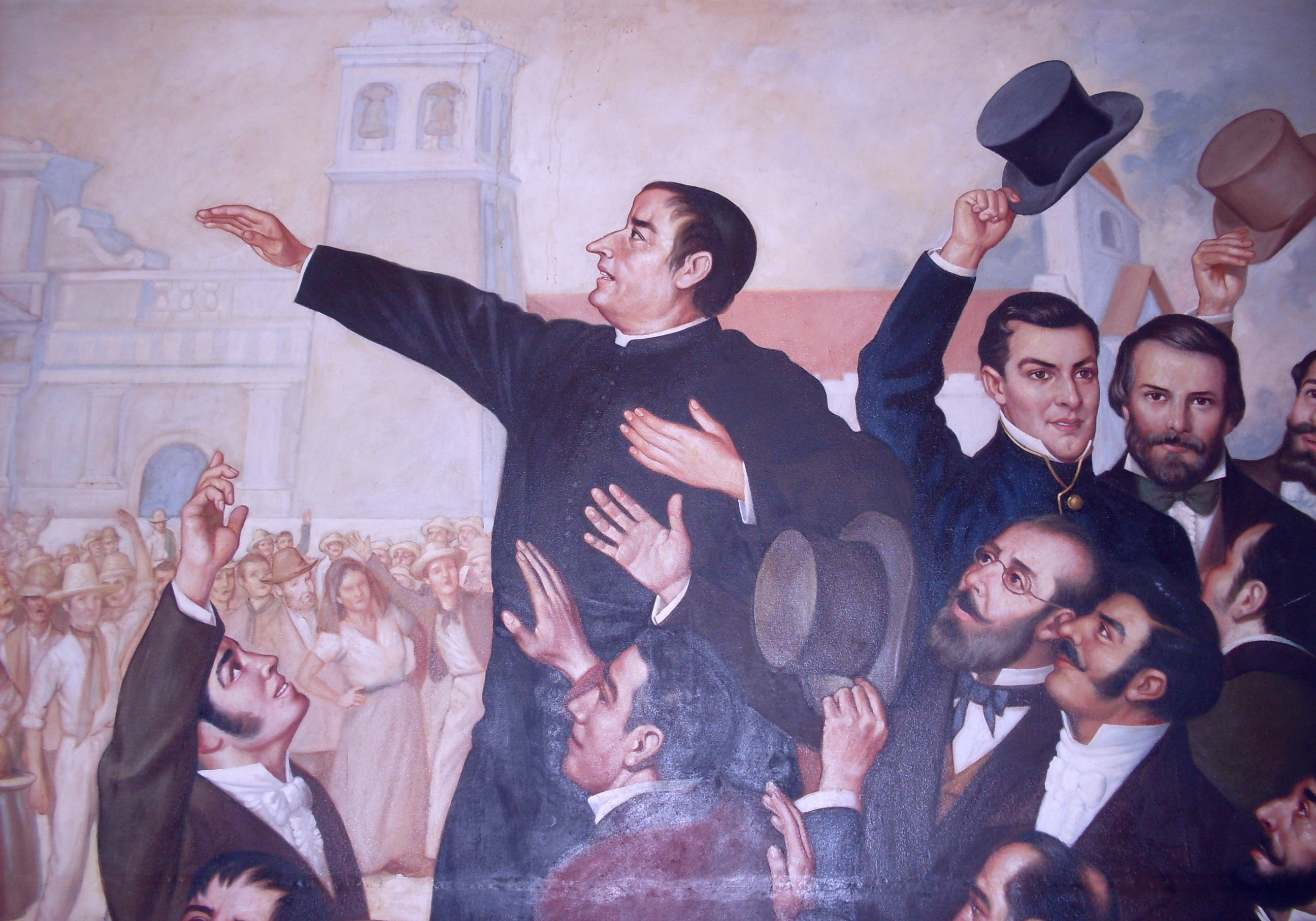 Detalle del cuadro "Primer Grito de Independencia" del chileno Luis Vergara Ahumada en la ex Casa Presidencial de El Salvador.